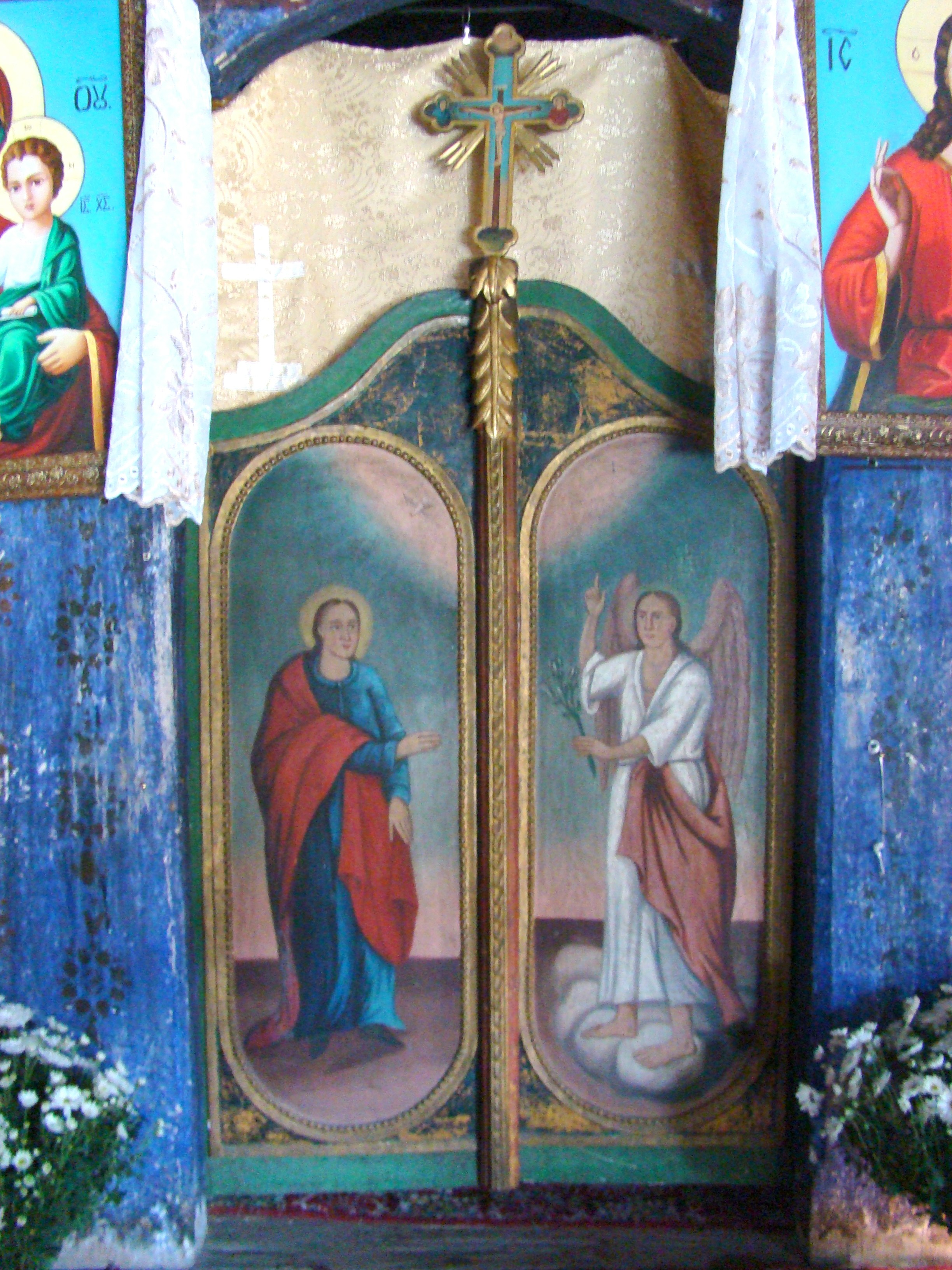 Biserica de lemn „Sfinții Arhangheli Mihail și Gavriil” din Țărmure, județul Arad